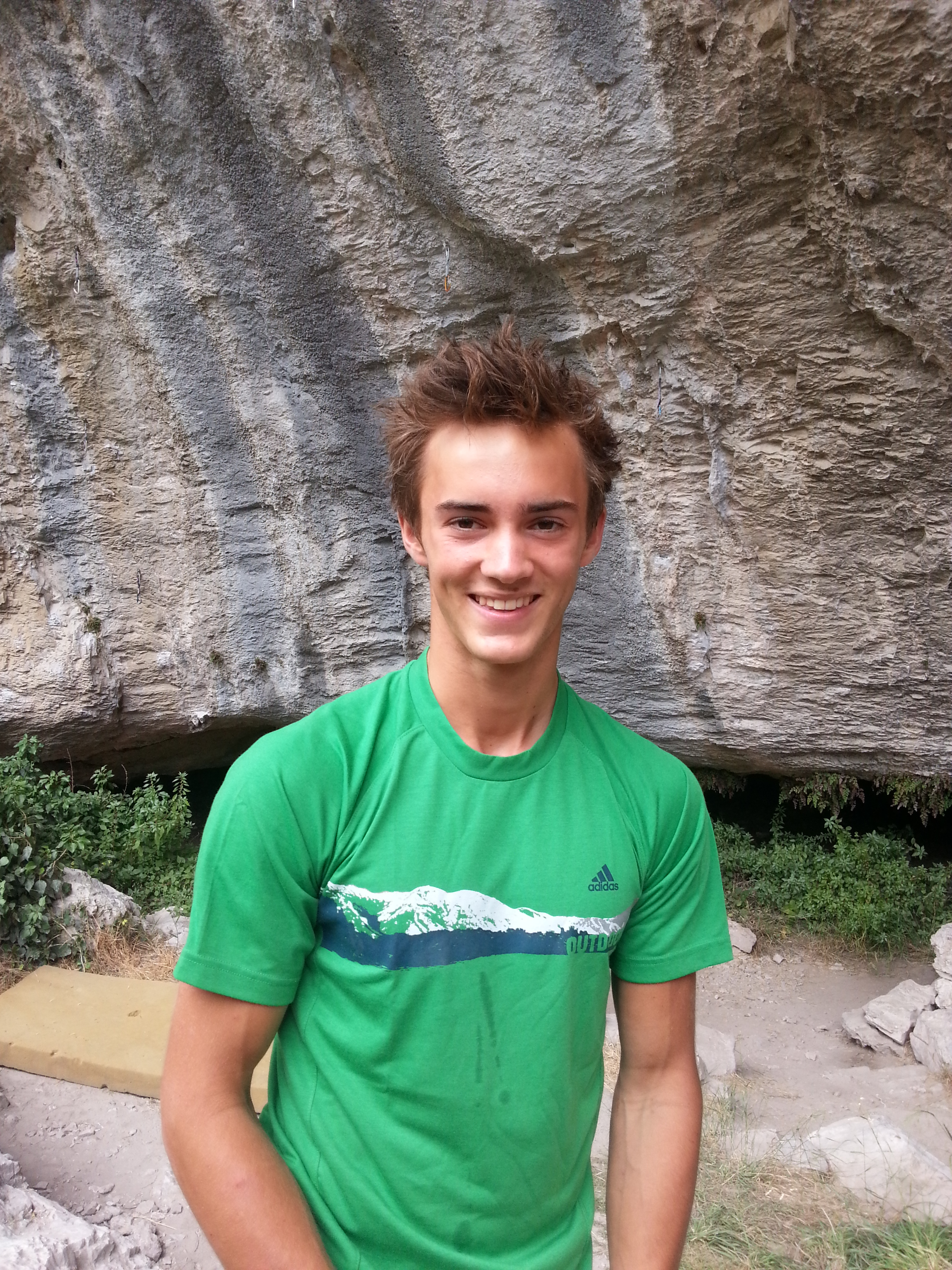 Loïc Timmermans à Déversée dans les Gorges du Loup